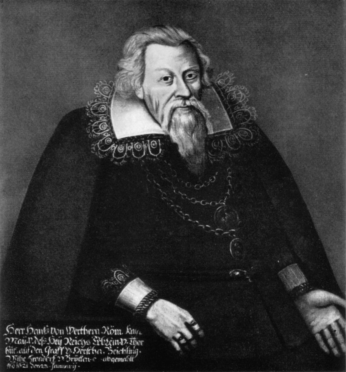 Hans von Werthern (1555-1633), Herr der Grafschaft Beichlingen sowie der Herrschaften Wiehe, Brücken und Frohndorf, des Heiligen Römischen Reichs Erbkammertürhüter. Stammvater aller blühenden Linien des Geschlechts.